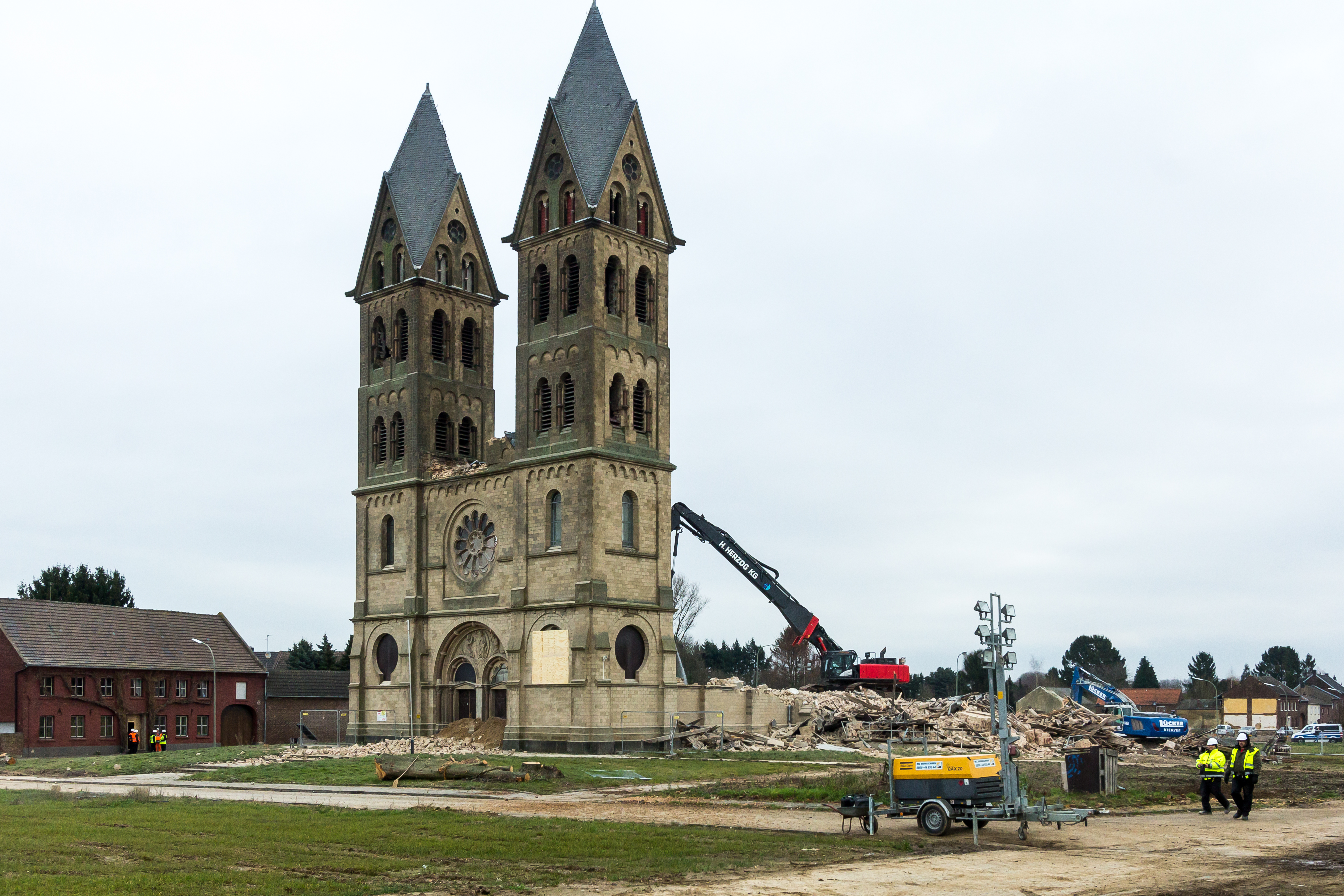 Abriss Immerather Dom, St. Lambertus